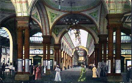 Centralbahnhof Stuttgart, Innenansicht der Bahnhofshalle